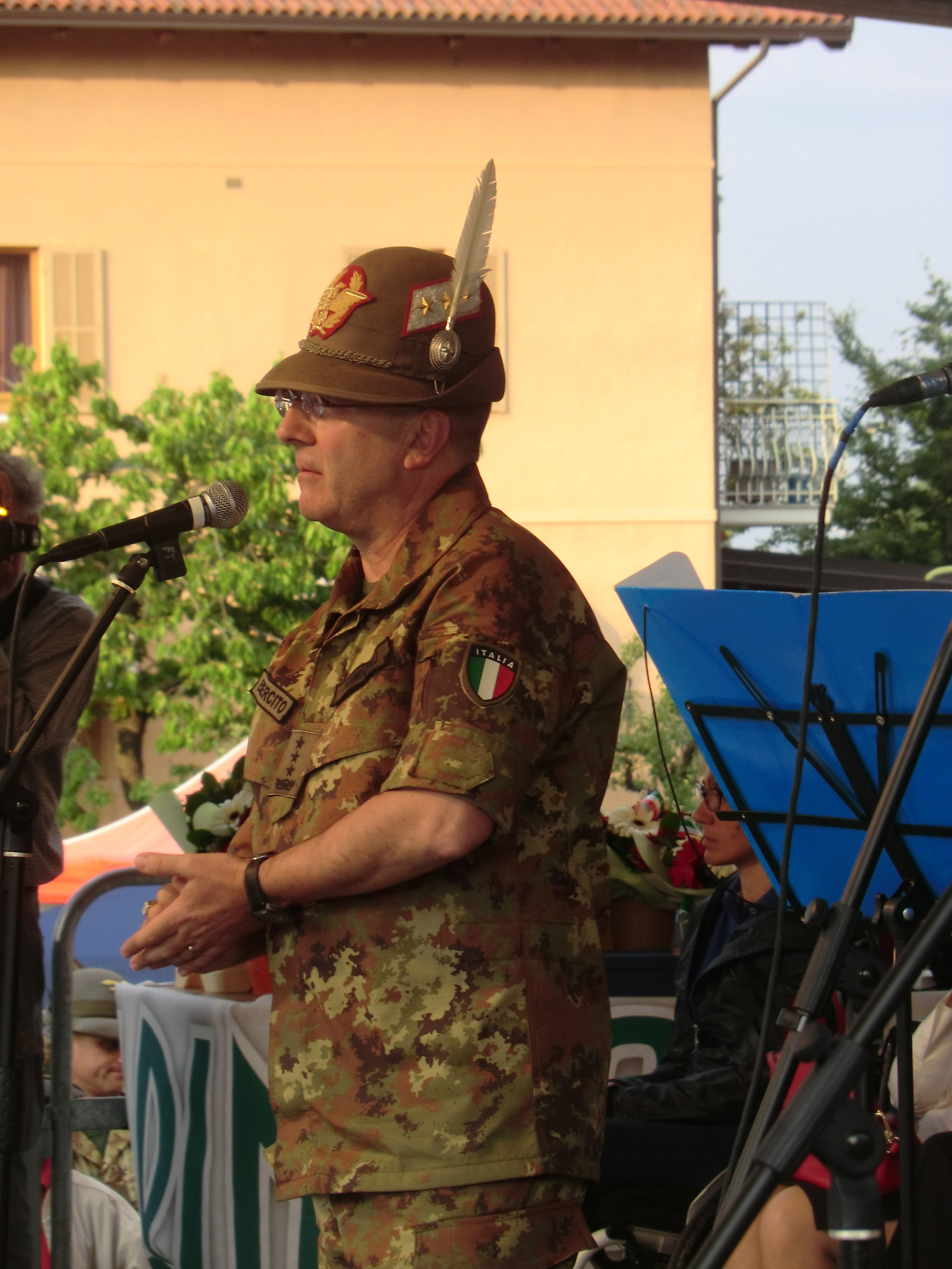 Alberto Primicerj nel 2014 alle alpiniadi estive del 2014 in qualità di comandante delle truppe alpine